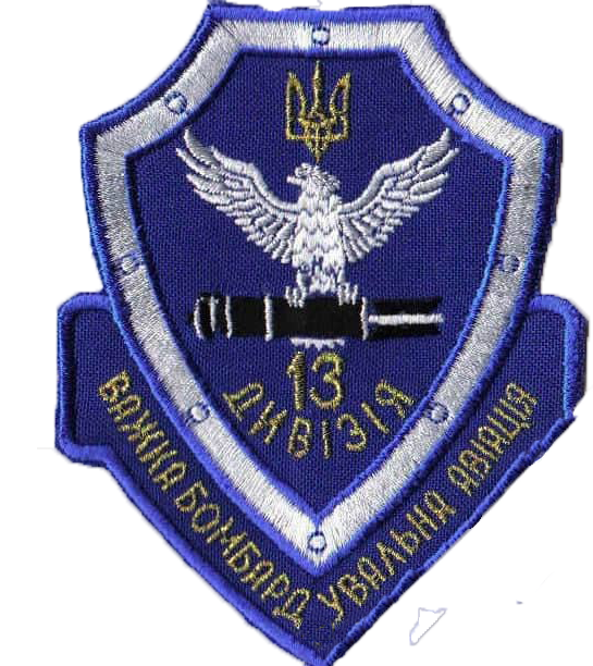 Шеврон 13 важкої бомбардувальної авіаційної дивізії. Автор Ляхов Валерій Борисович